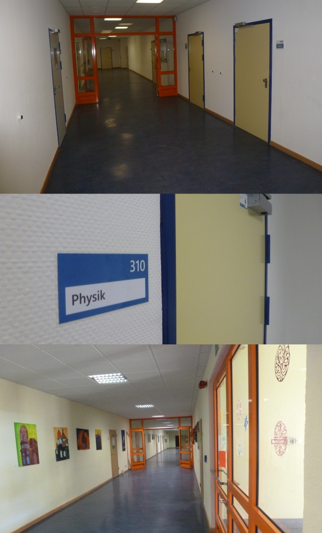 Innenansicht des Melanchthon-Gymnasiums in Berlin-Hellersdorf. Fotomontage: zwei Etagen aus Haus 1 & 2 und ein Raumschild.